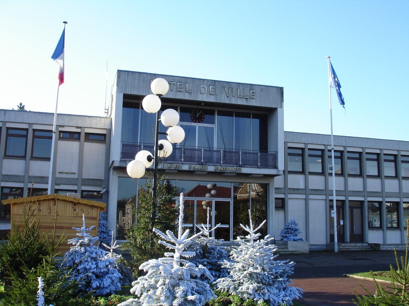 L'hôtel-de-ville - Soisy-sous-Montmorency (France)